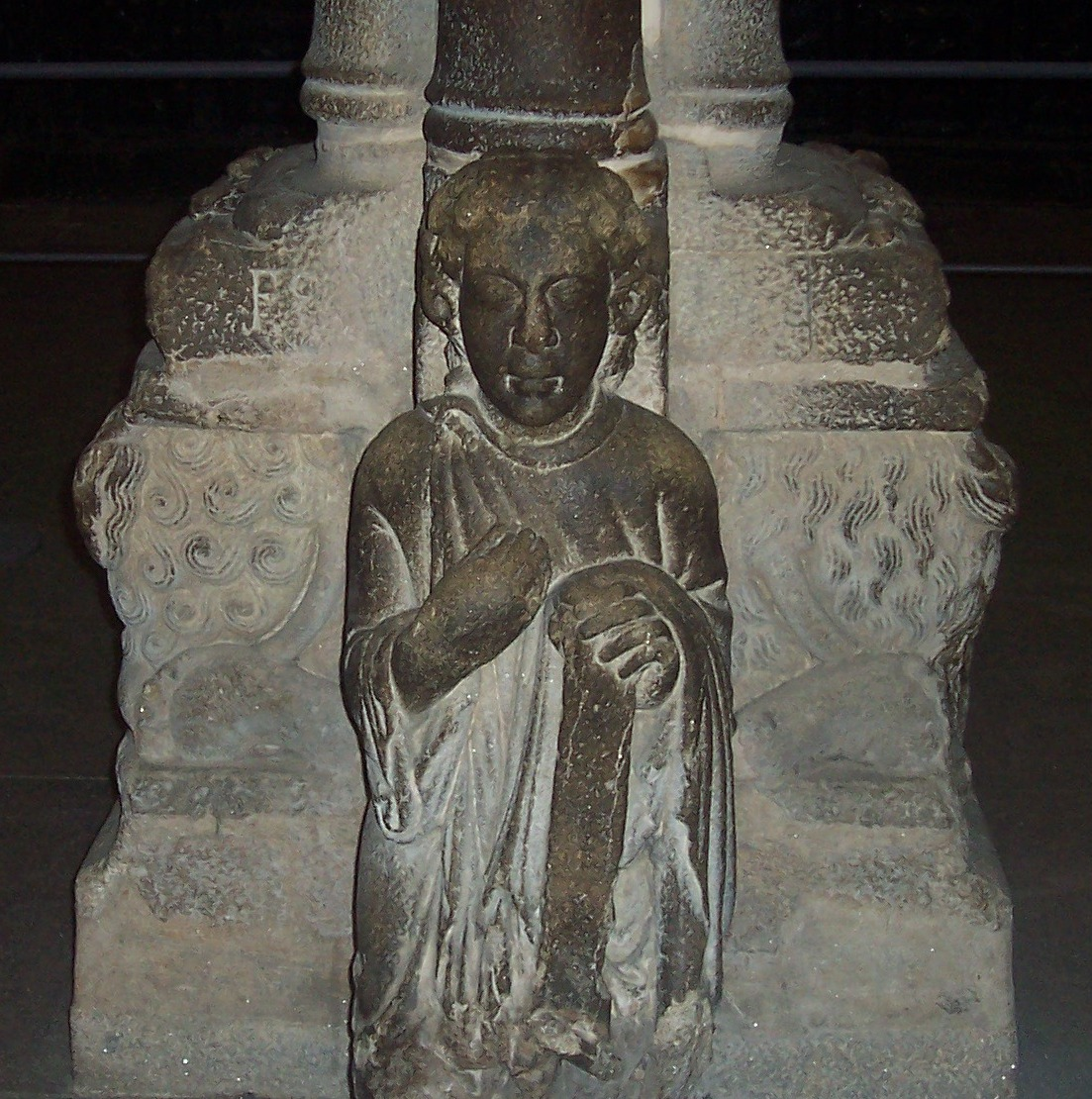 Mestre Mateo (Santo dos Croques). Catedral de Santiago de Compostela